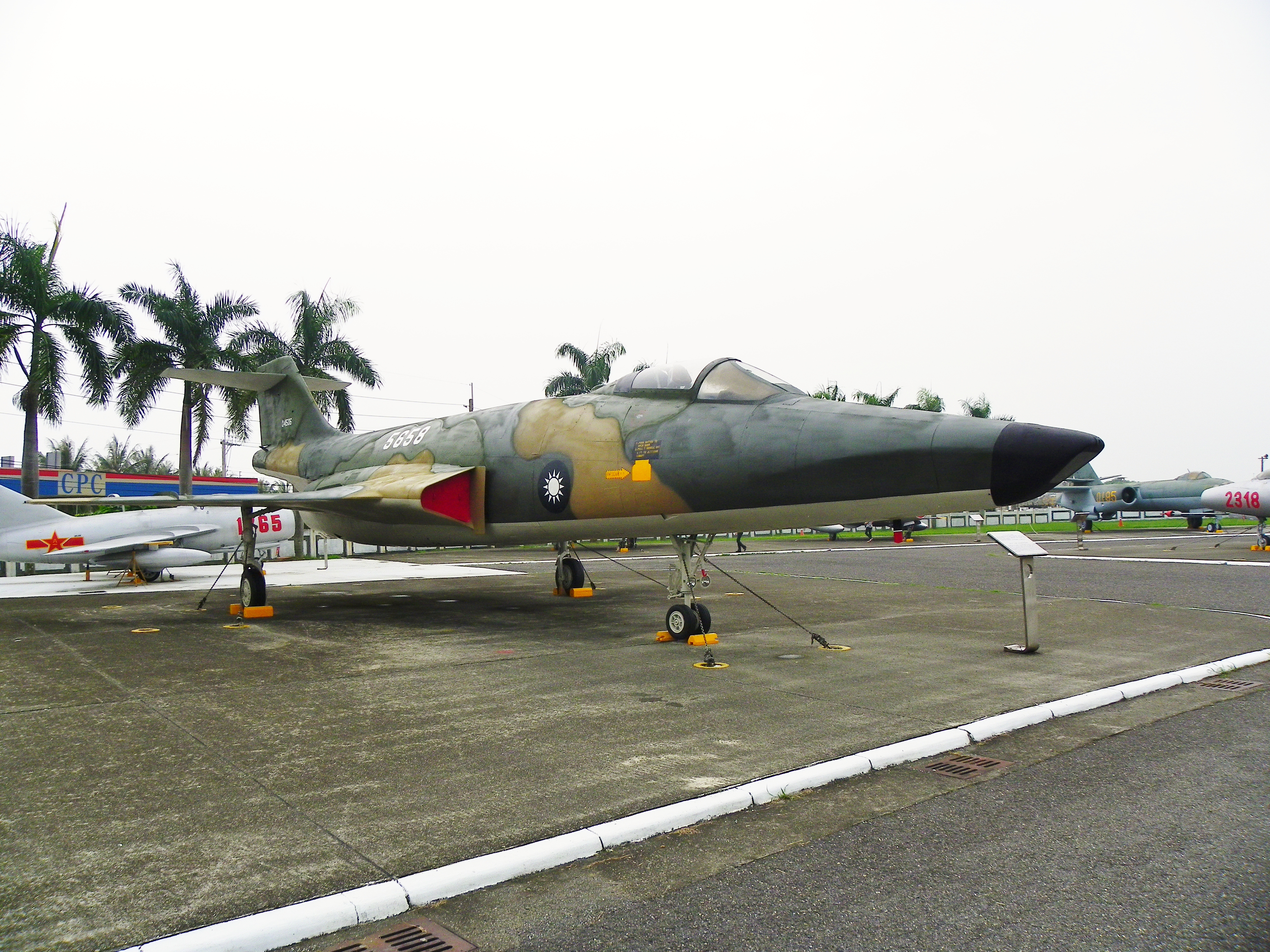 岡山空軍官校軍機展示場的RF-101A戰鬥偵察機，主用於對中國大陸內地的長距離偵照任務，1959年起服役，至1968年除役。